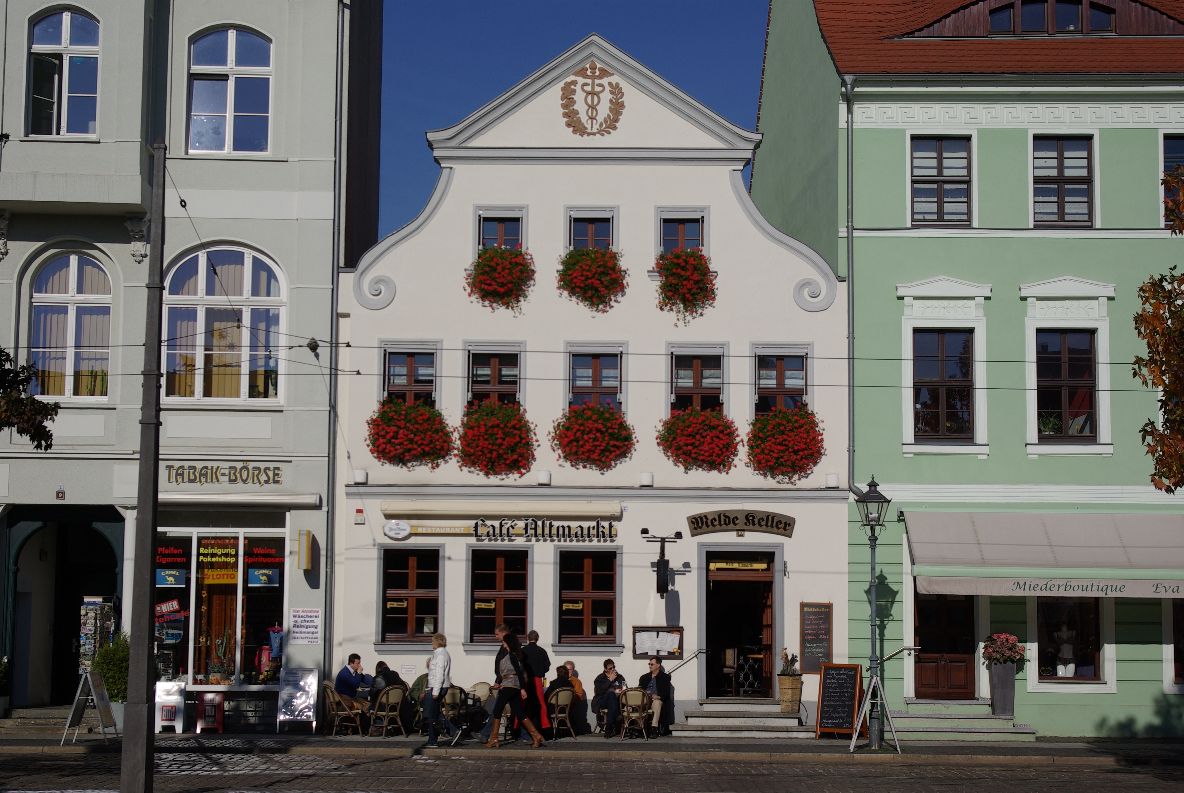 Cottbus in Brandenburg. Das Haus Altmarkt 10 steht unter Denkmalschutz.